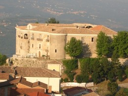 Gesualdo, il Castello visto da Via Quote Mercato